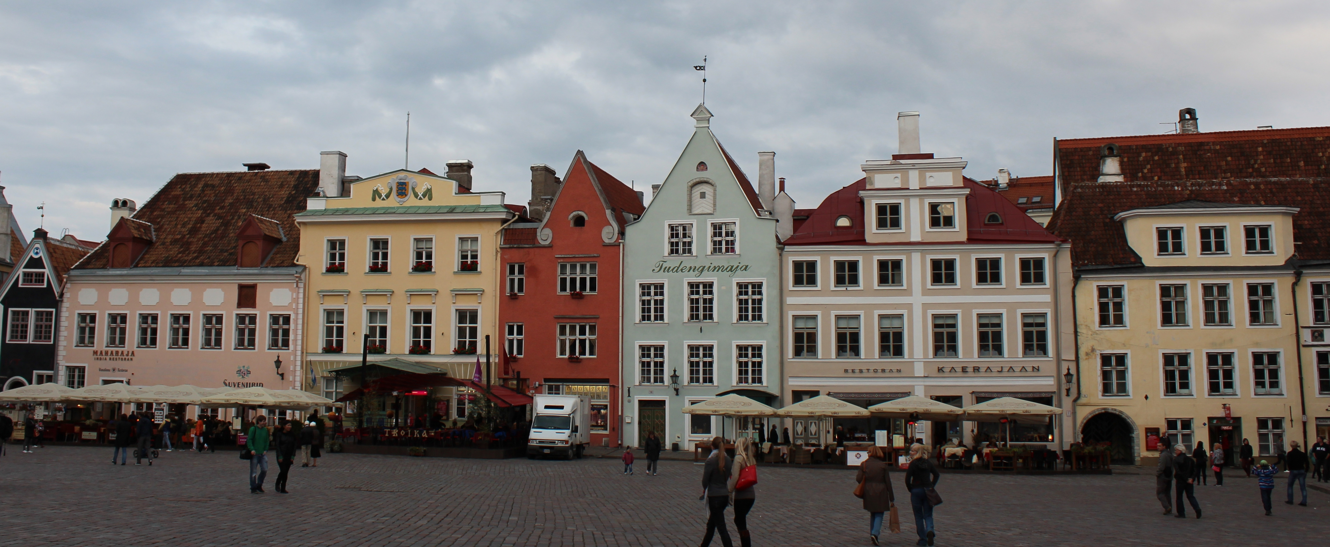 Raekoja plats majad 12, 13, 14, 15, 16, 17, 18